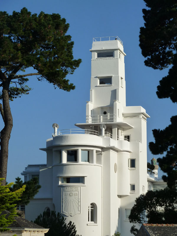 Villa le Minaret